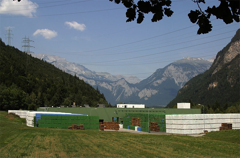 Gebäude und Lager der Mineralquelle Rhäzüns